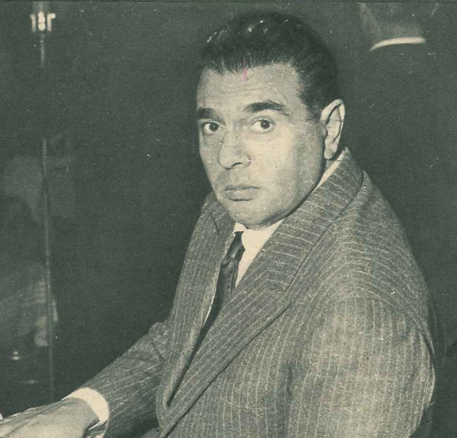 Giovanni D'Anzi (né à Milan le 1er janvier 1906 et mort à Santa Margherita Ligure le 15 avril 1974) est un musicien et compositeur italien.